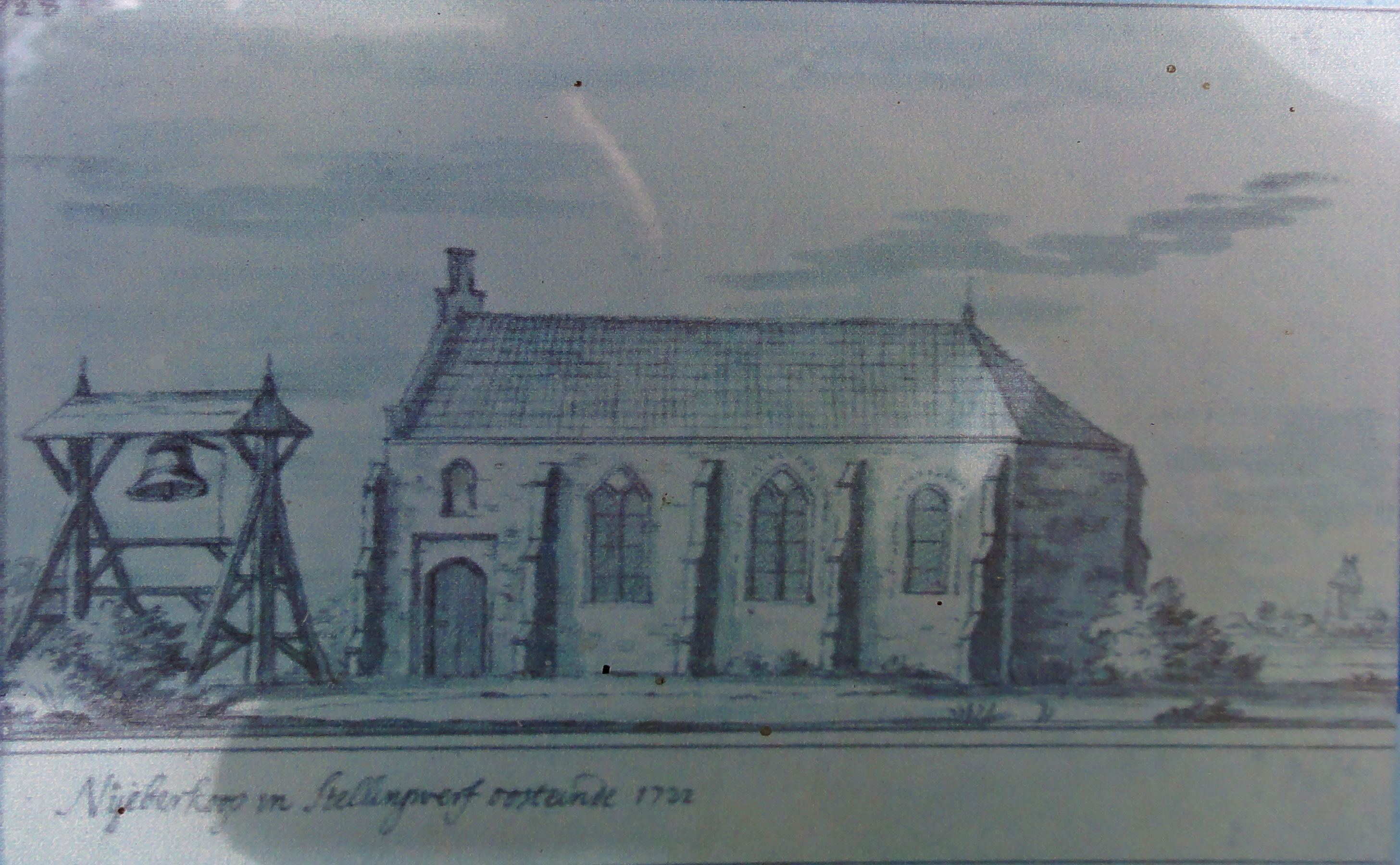 Kerk van Nijberkoop op een prent van Jacobus Stellingwerff